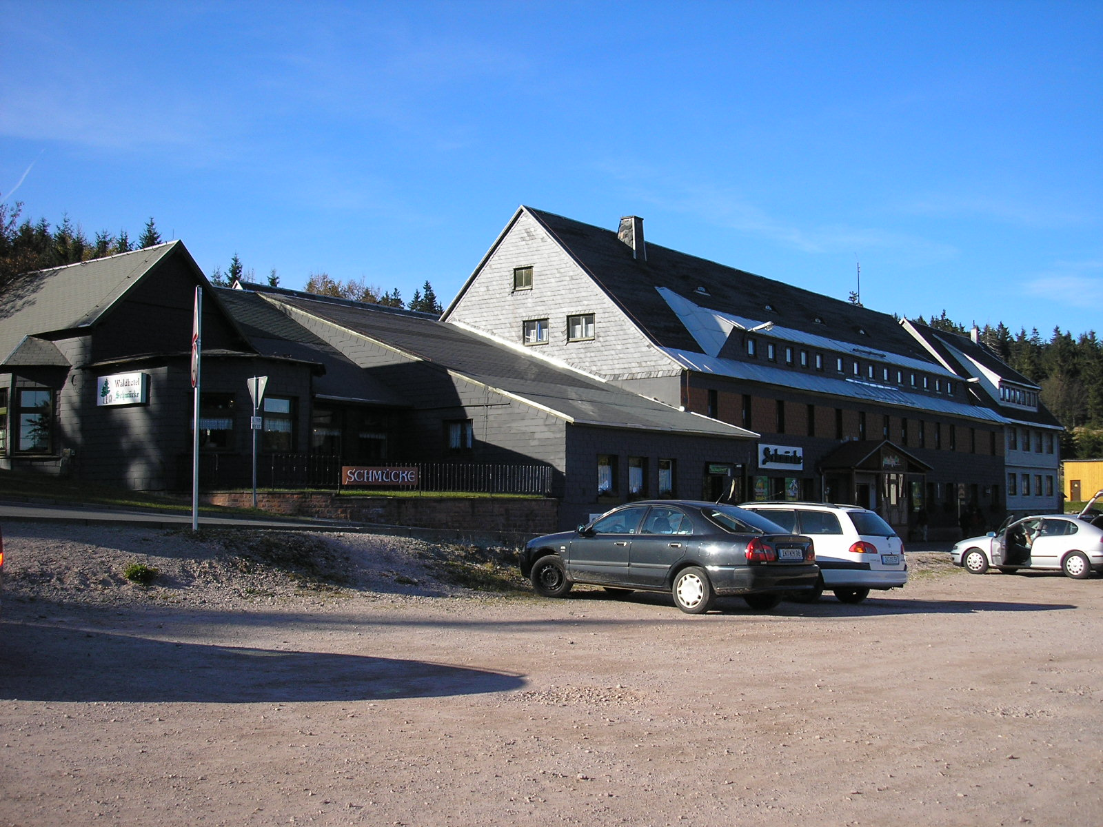 Die Schmücke bei Oberhof (Thüringen).